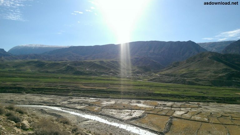 روستای دره بنیاب